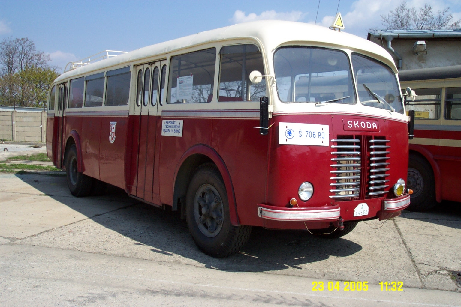 Autobus Škoda RO